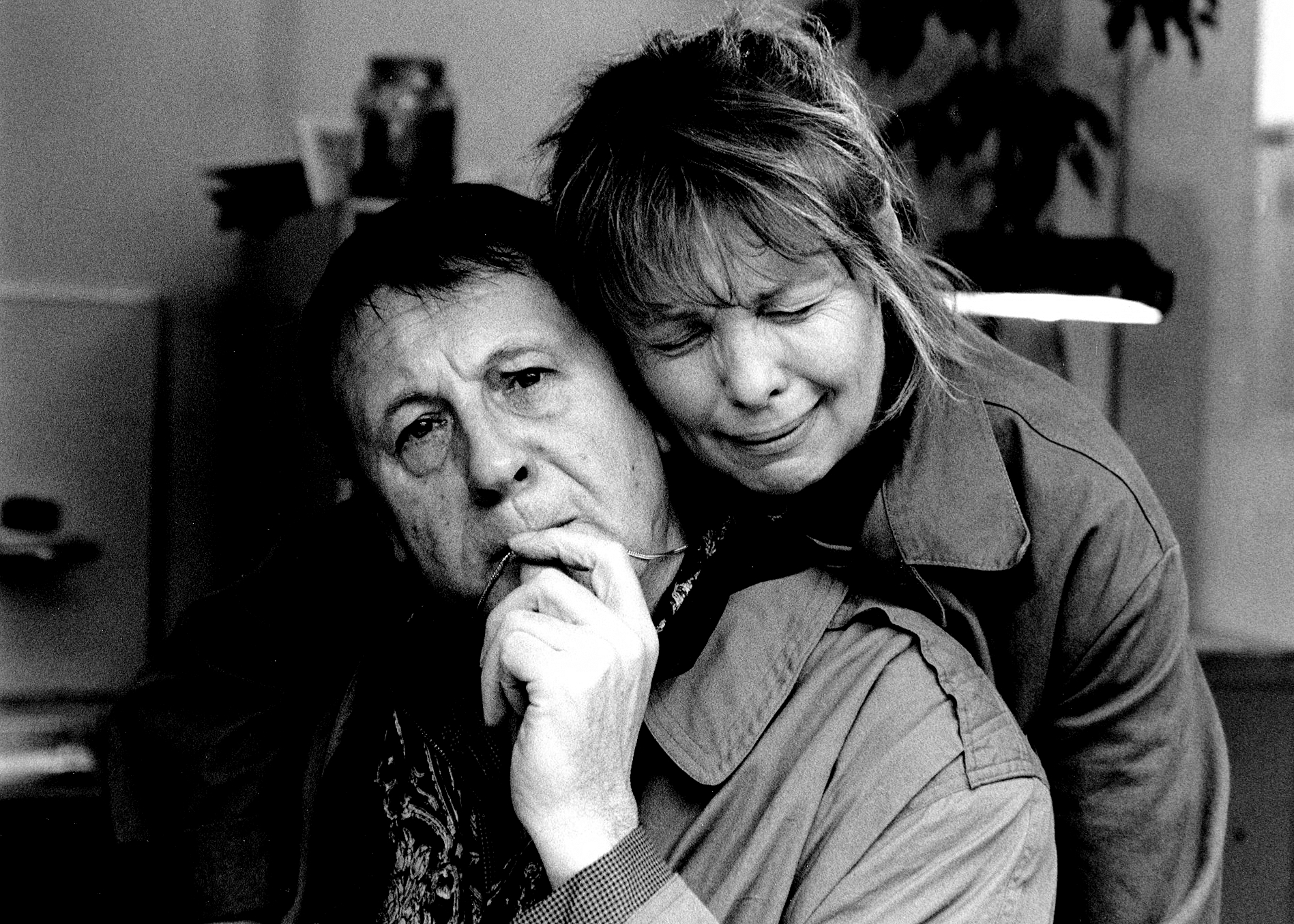 Der Tod zu Basel, Film von Urs Odermatt. Günter Lamprecht (links), Hilde Ziegler (rechts).